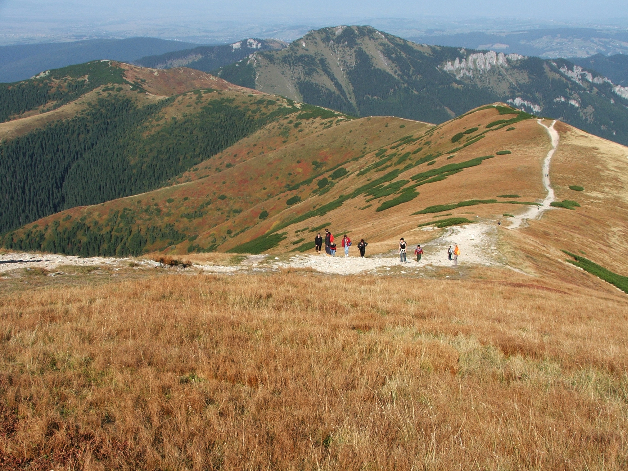 Długi Upłaz (Tatra Mountains, Rakoń, Grześ)